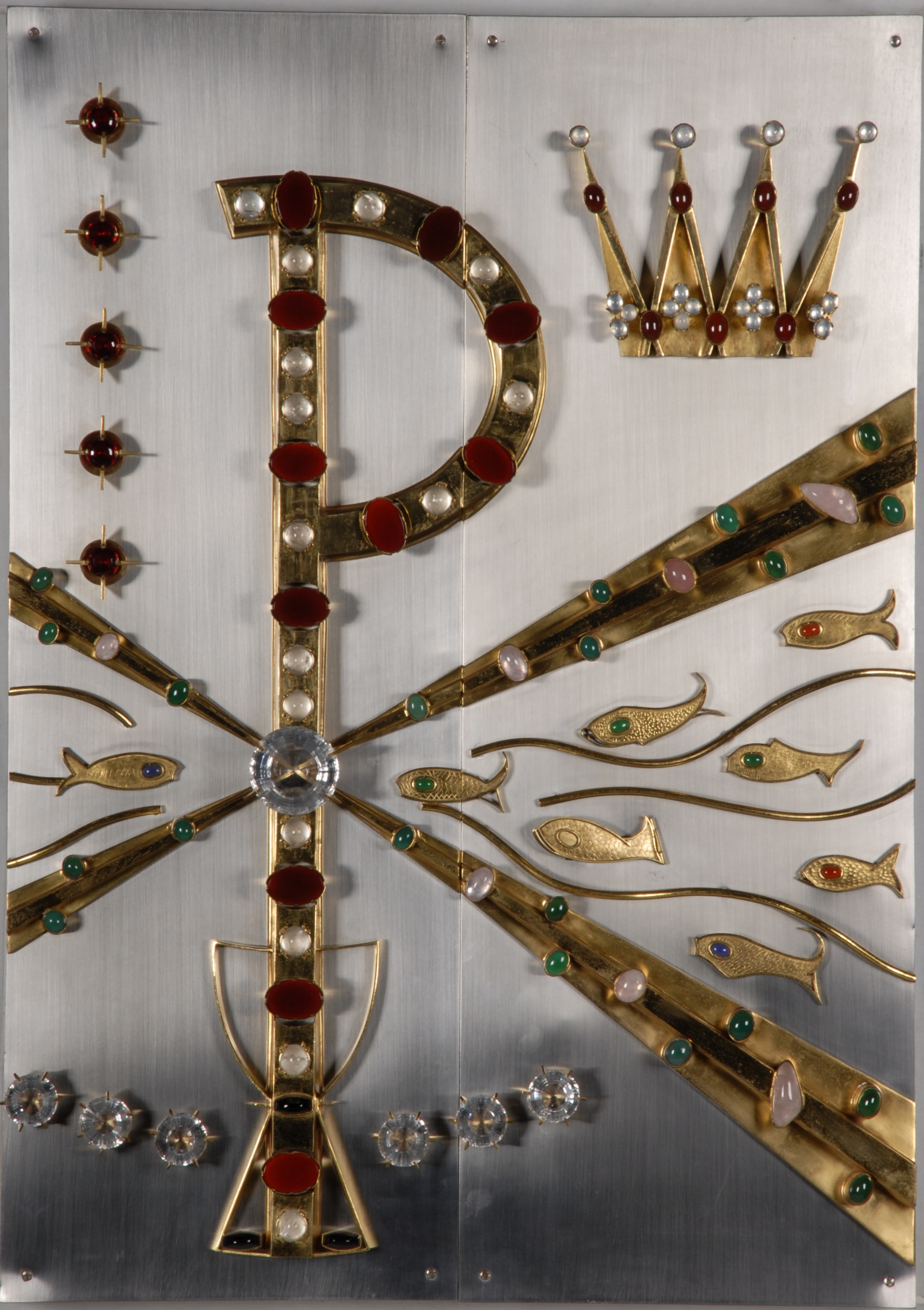 Tür des Tabernakel